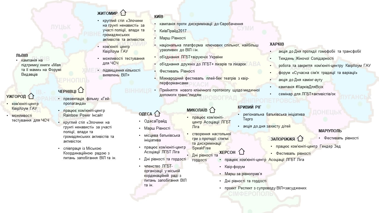 Активності, які були названі учасницями та учасниками Національної конференції як такі, що "суттєво повпливали на ЛГБТ-спільноту за останній рік".